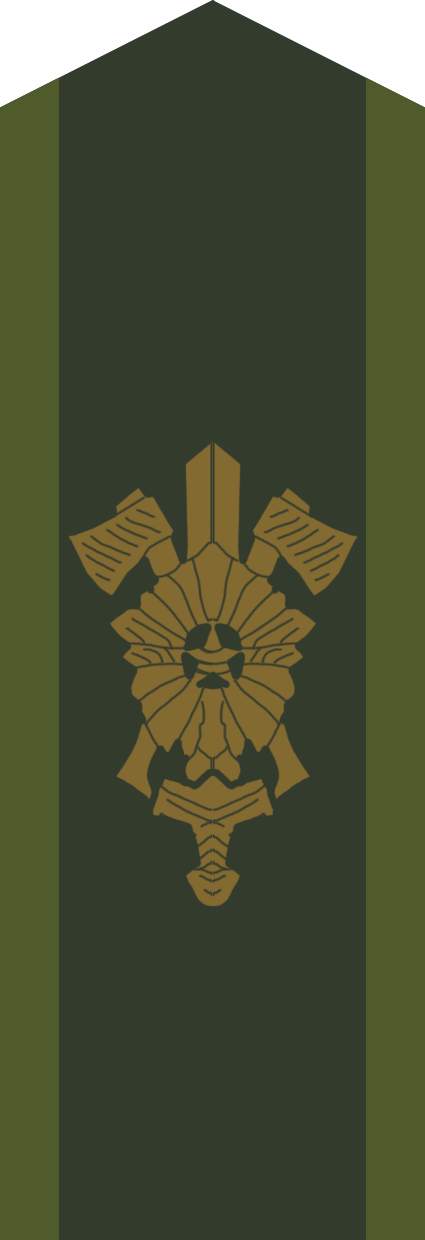 Kragspegel m/58, truppslagstecken för ingenjörstrupperna.